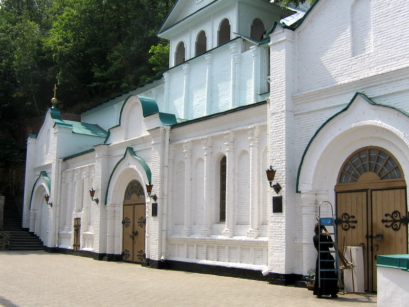 Svyatogorskaya Lavra